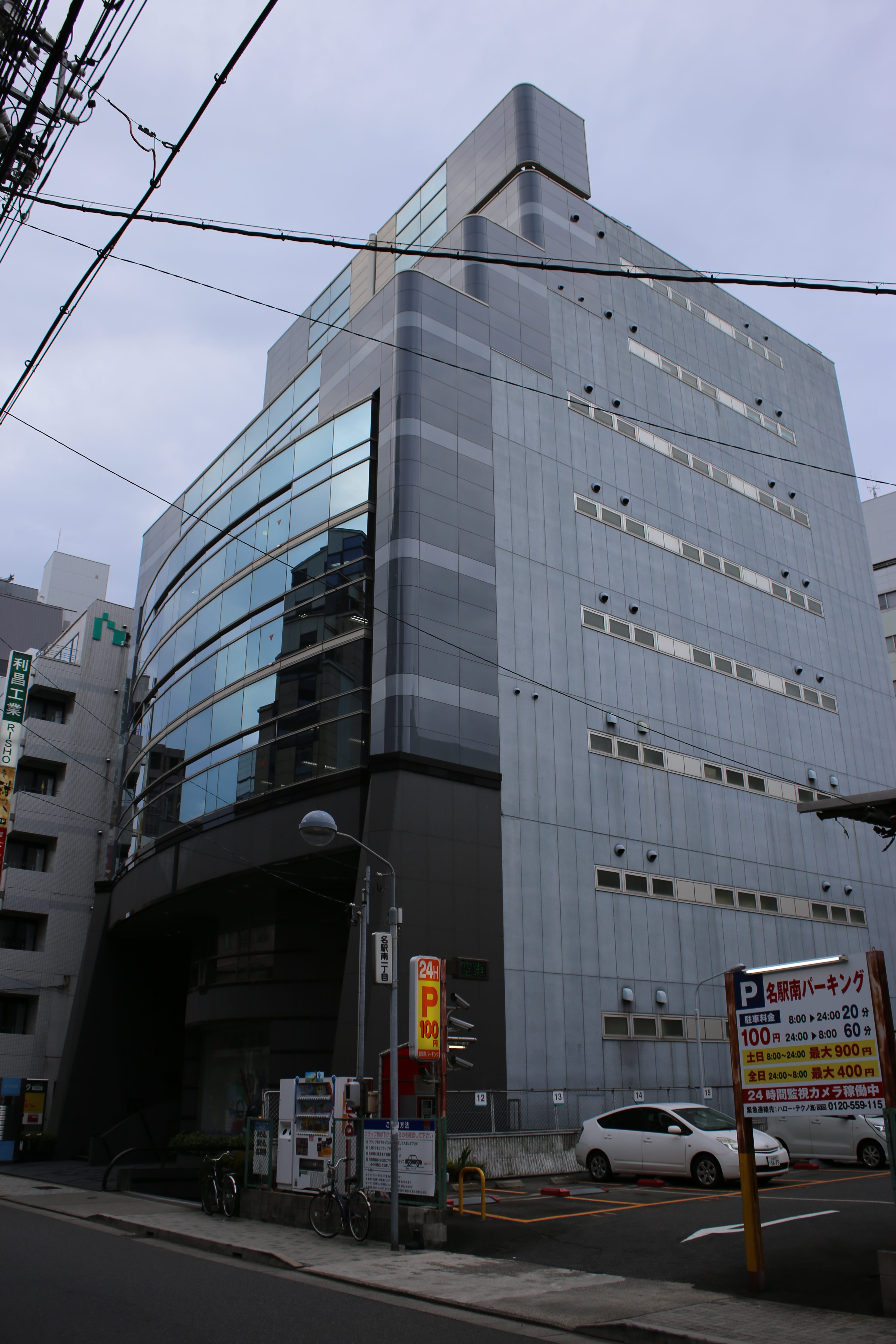 名古屋市中村区名駅南一丁目のネオ笹島を南側公道東側より撮影